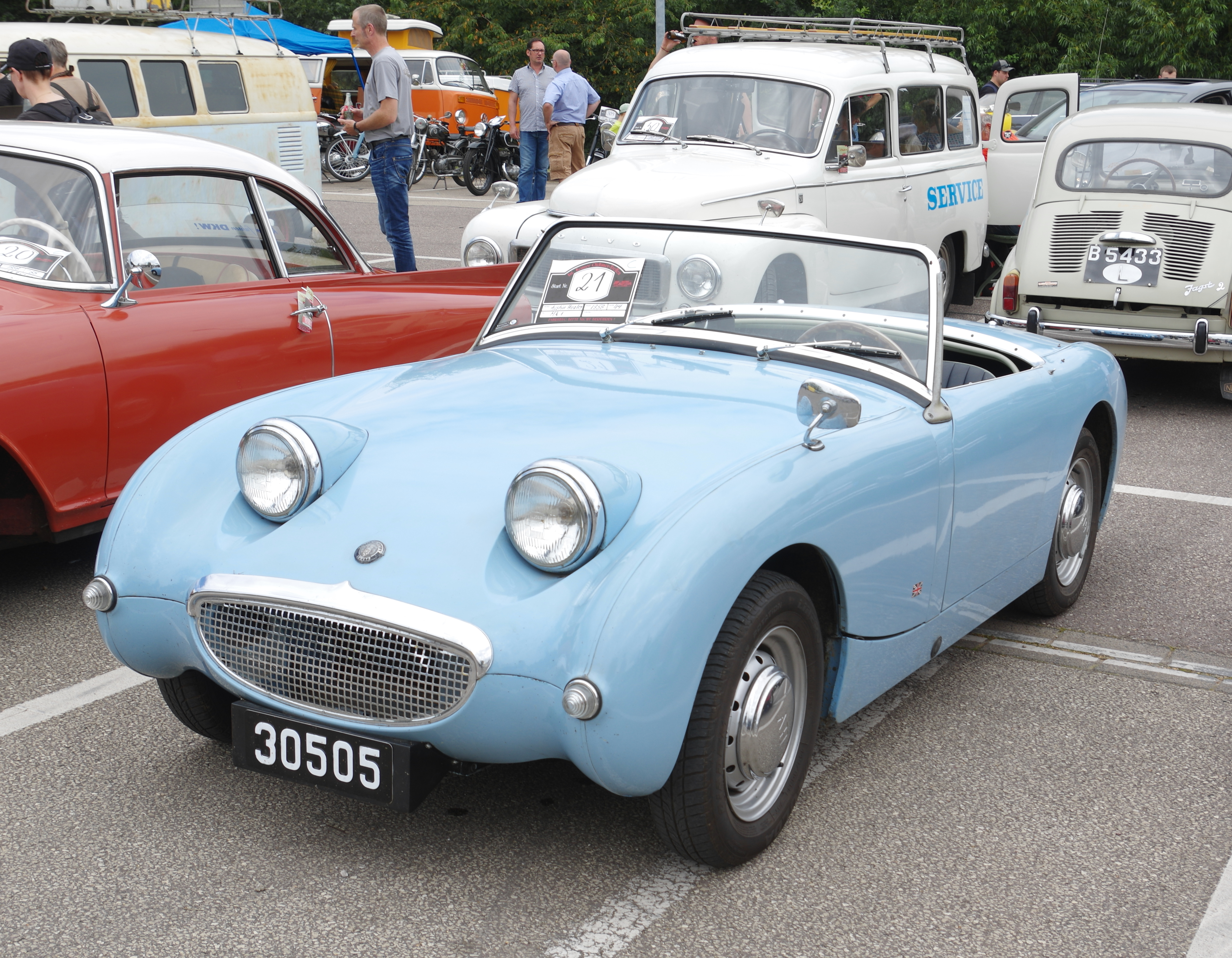 Austin Healey MK 1, 1958, 44 PS, 32. Internationales Oldtimer Treffen Konz 2016, Das Nummernschild ist verfälscht!